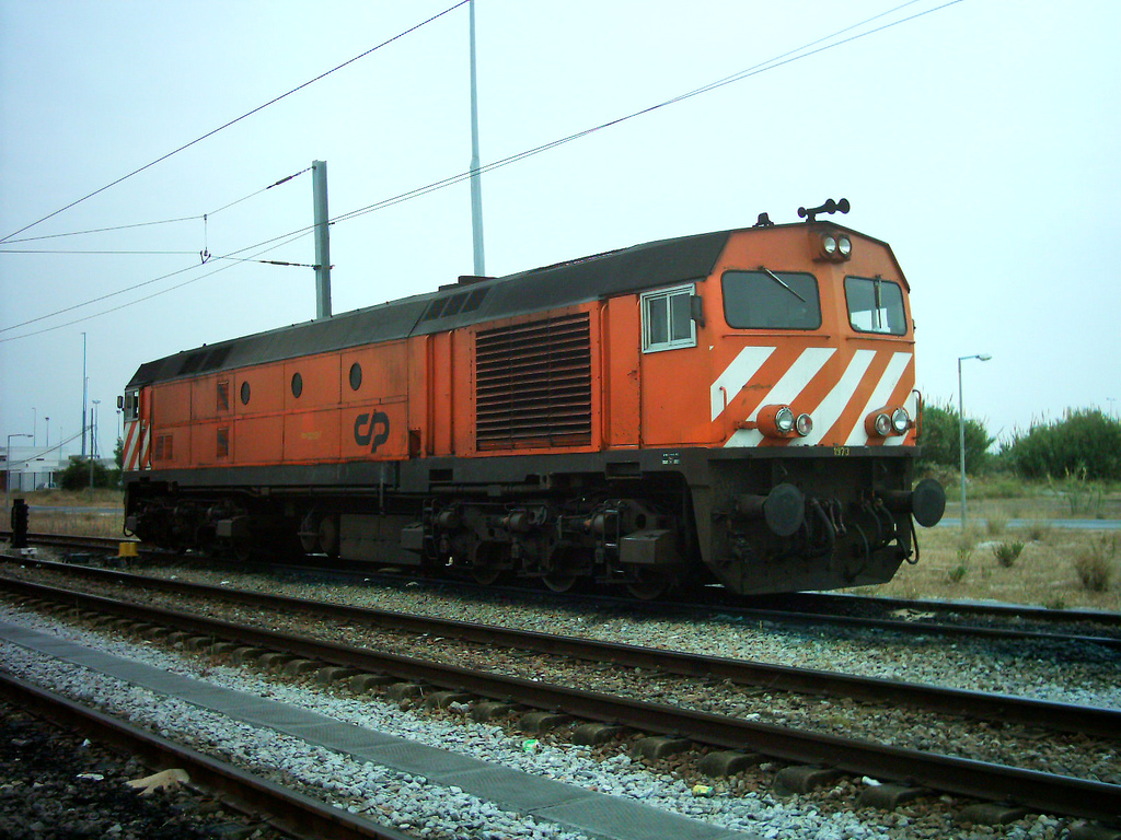 Bobadela: ramal com locomotivas